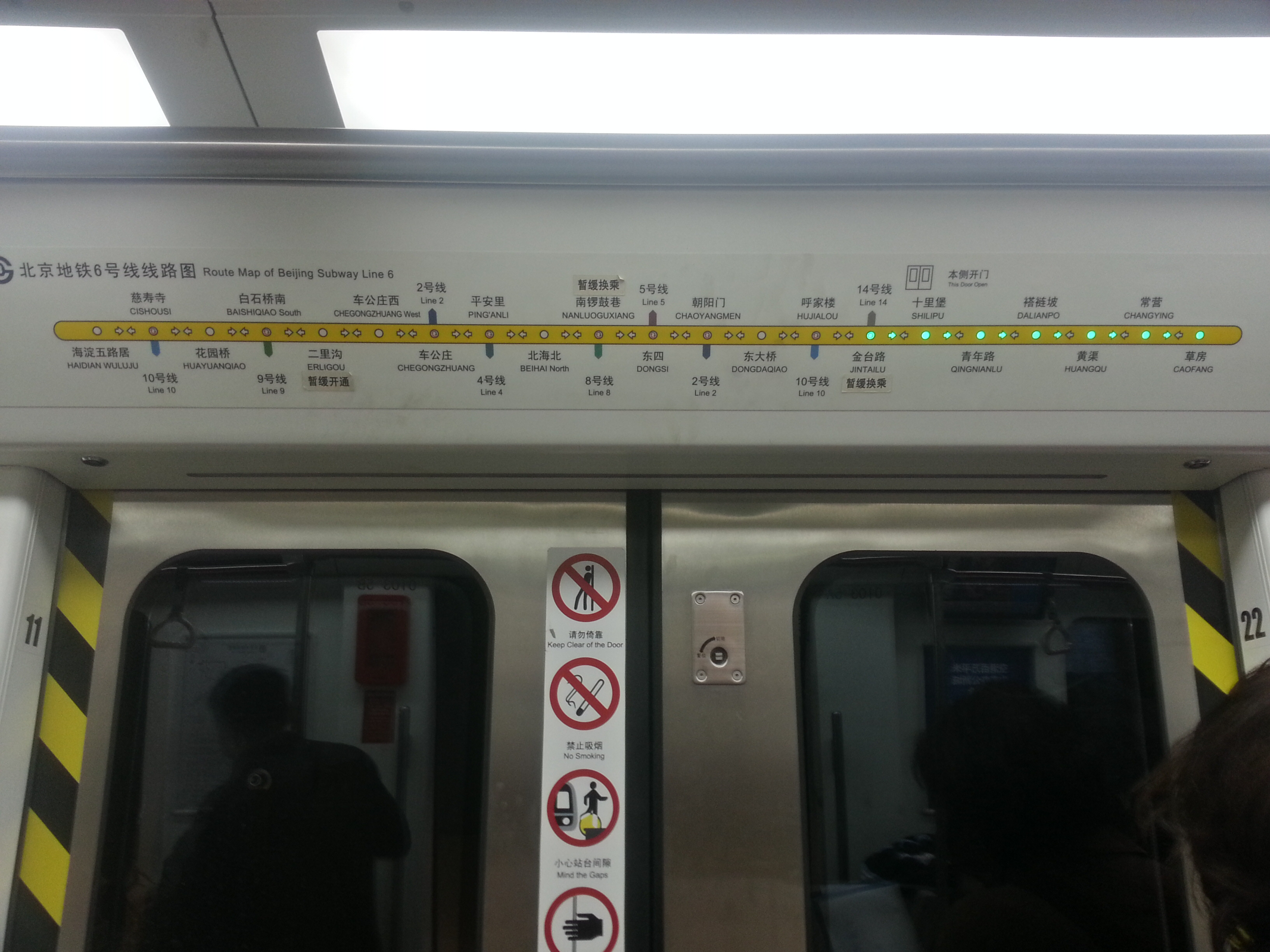 北京地铁6号线闪灯图